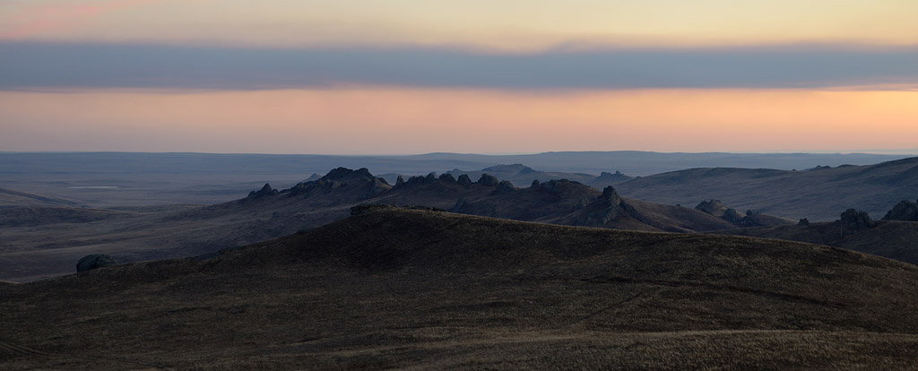 Даурский заповедник. Участок Одон-Челон